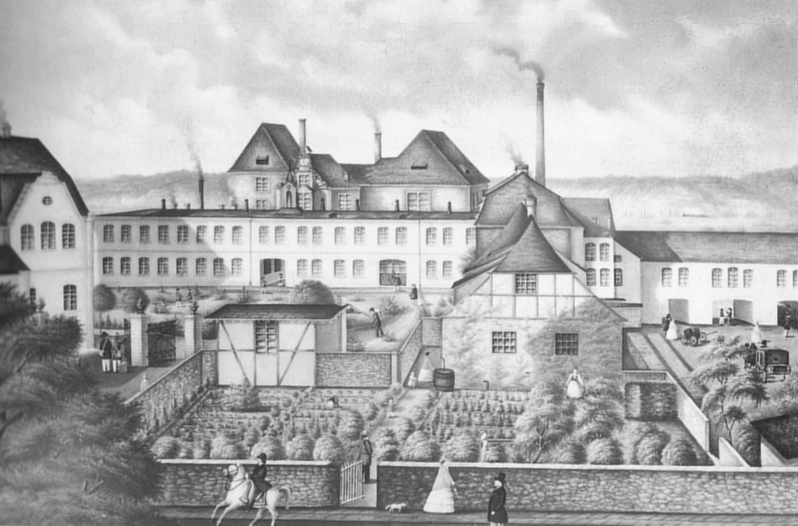 Porzellanmanufaktur Fürstenberg im Schloss Fürstenberg mit Anbauten für die Manufaktur